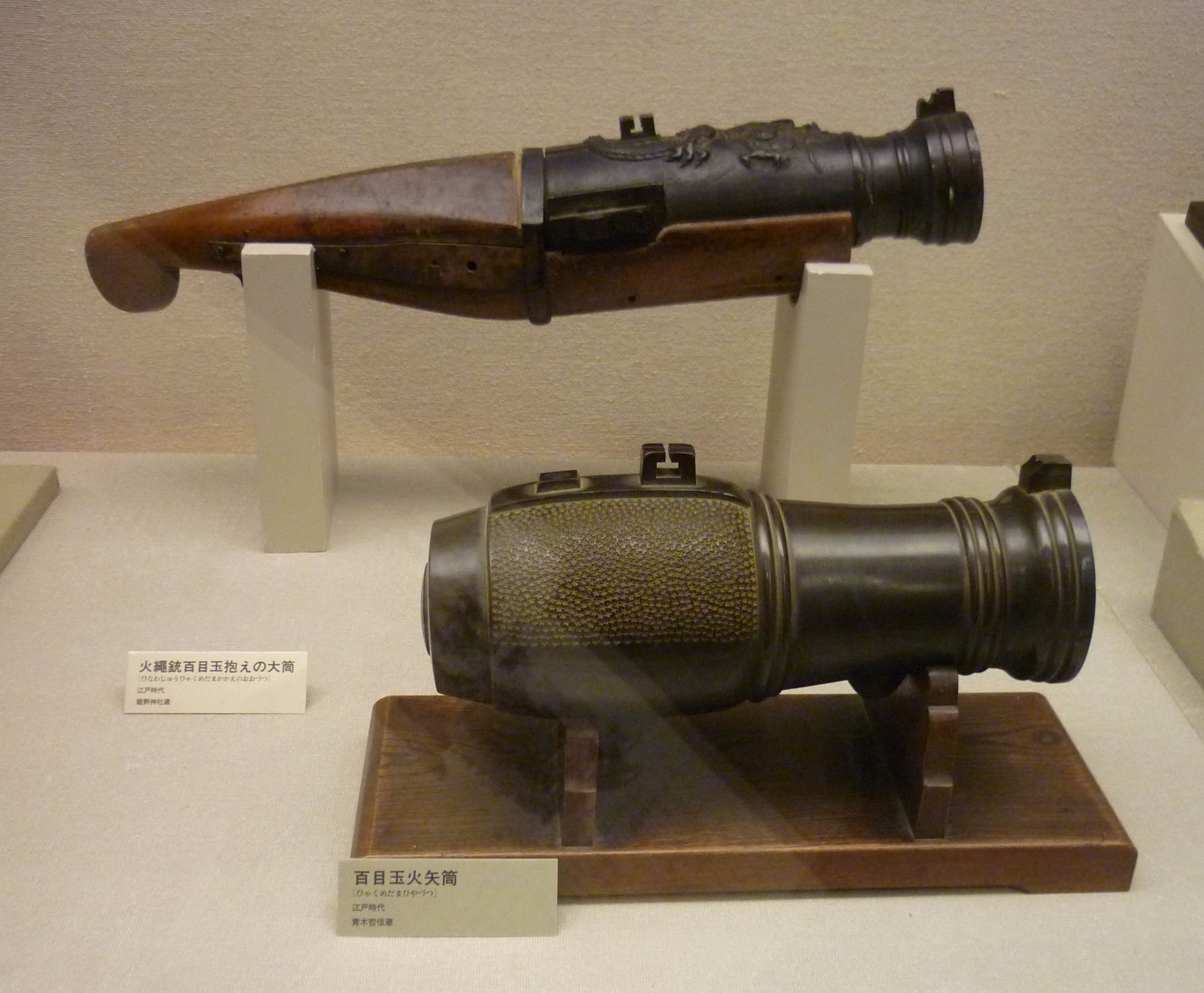 百目玉火矢銃と火縄銃百目玉抱え大筒 (Hiya zutsu (fire arrow matchlock) top, Hiya taihou (fire arrow cannon) bottom.